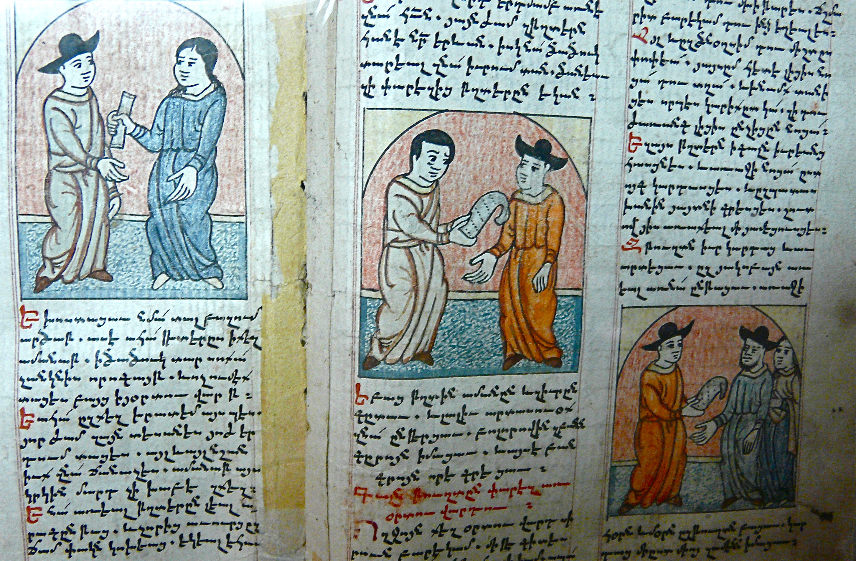 Matenadaran - Het manuscriptenmuseum. Voor het museum bevindt zich een standbeeld van Mesrop Mashtots, de ontwerper van het Armeens alfabet. Het museum herbergt 16000 oude en verlichte manuscripten. Het oudste "Het evangelie van Lazarus" uit 887. Het grootste: 34 kg wegend en gemaakt van 700 koeievellen en tevens het kleinste evangelie: 12 gram wegend en 3x4cm groot. Zie ook